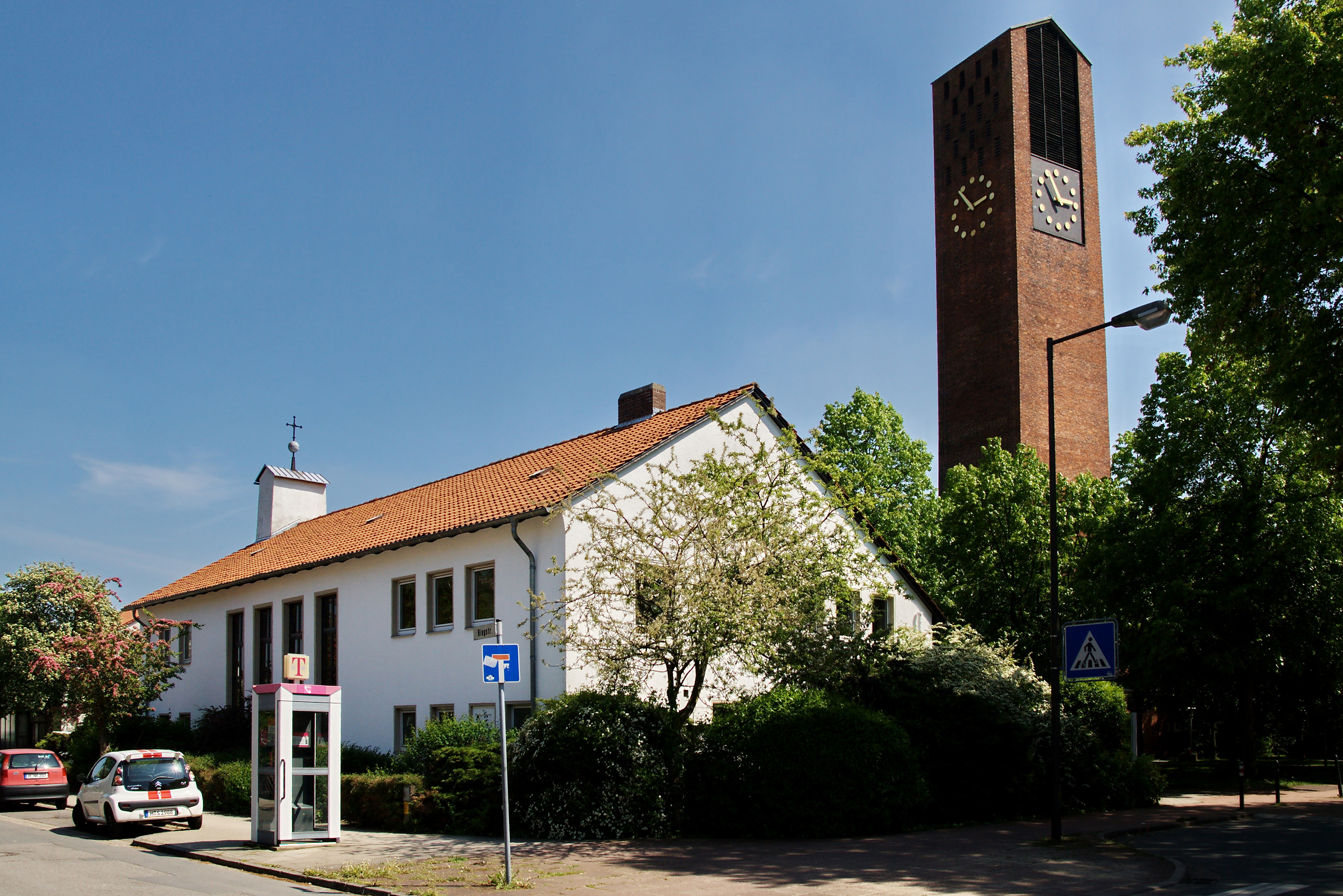 Emmaus-Kirche in Wiesenau (Langenhagen), Niedersachsen, Deutschland